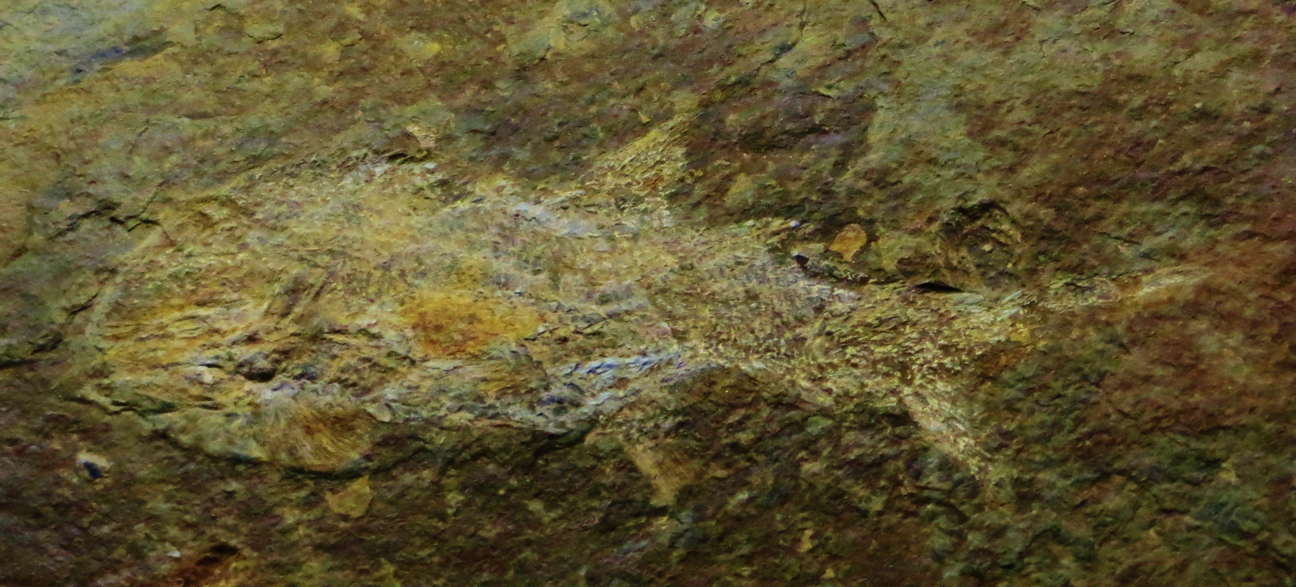 Fossil of Aeduella, an extinct fish - Took the picture at Museo di Storia naturale “Antonio Stoppani” - Venegono Inferiore